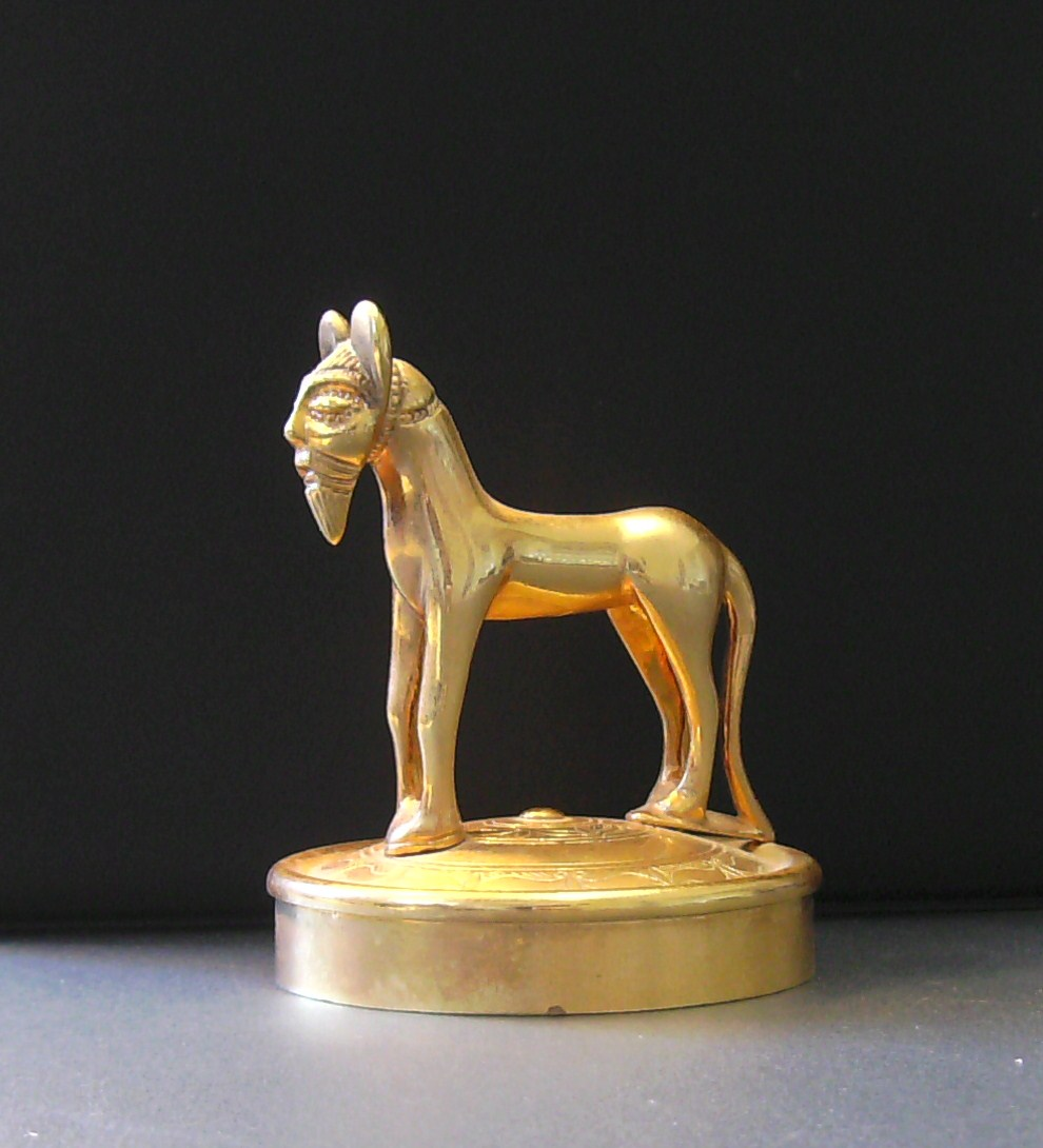 Europäischer Kulturpark Bliesbruck-Reinheim: Original-Abguss des "Reinheimer Pferdchens" auf dem Deckel der "Reinheimer Kanne" (Grabbeigabe des Fürstinnengrabes)